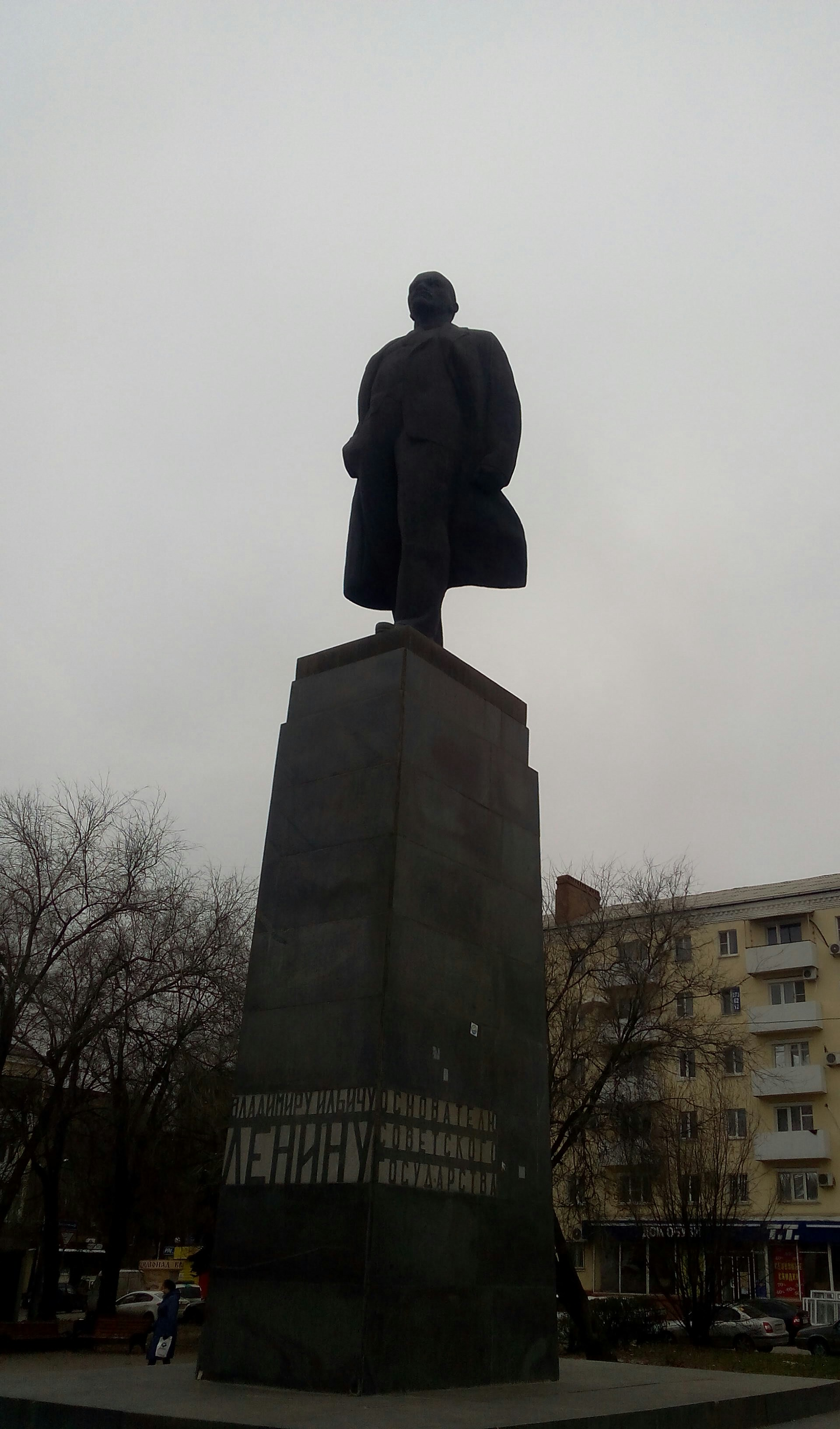 г. Ростов-на-Дону, площадь Ленина, памятник В.И. Ленину